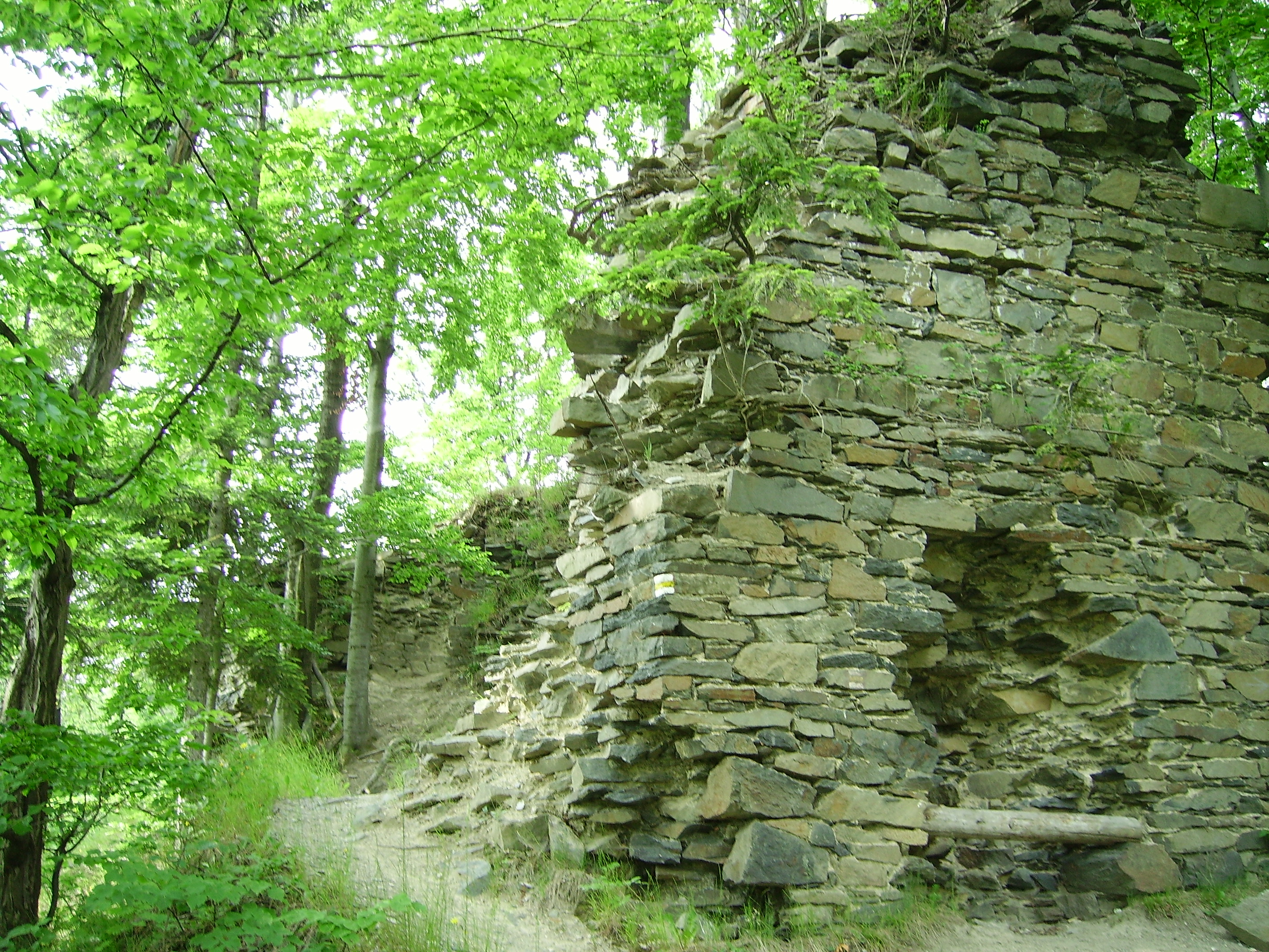 Puchart03.JPG